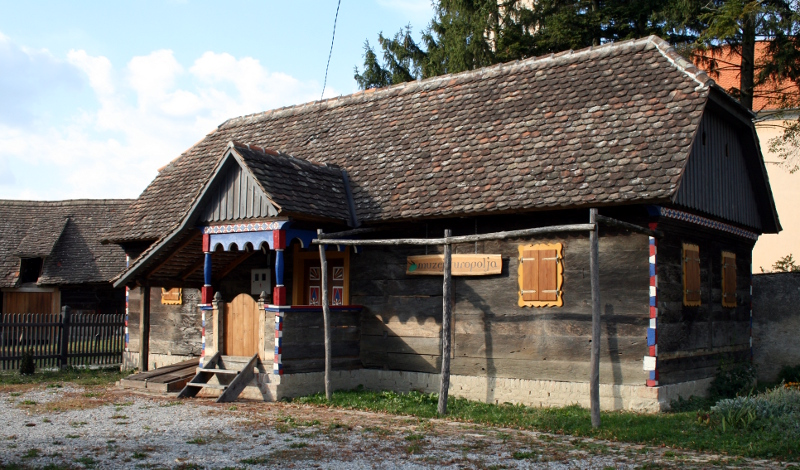 Muzej Turopolja u Ščitarjevu